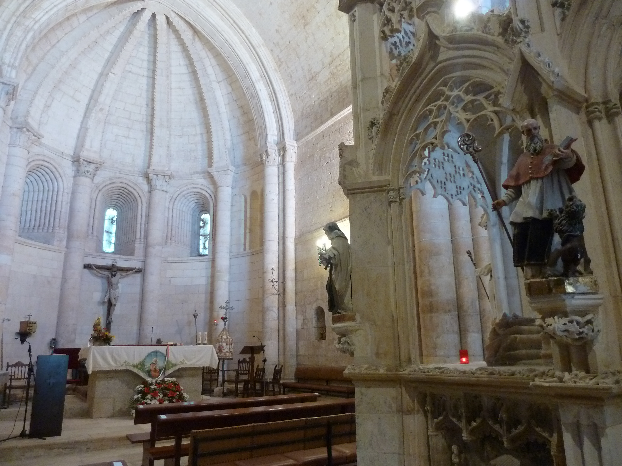 Vista parcial de la tumba y del altar mayor en el ábside central.